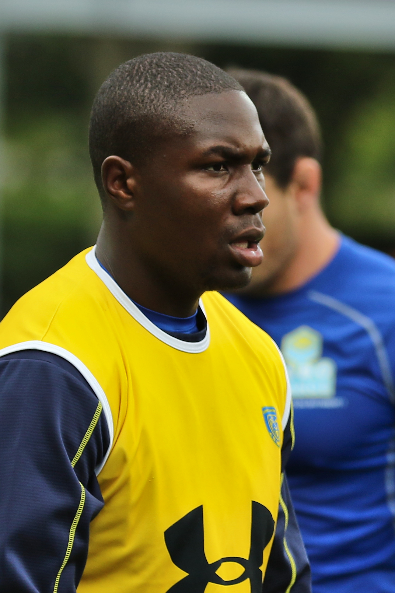 USO - ASM - 20150905 - Judicael Cancoriet